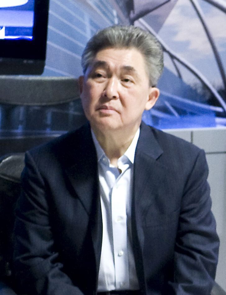 ประวิทย์ มาลีนนท์ / นายกรัฐมนตรี ออกอากาศสดรายการเชื่อมั่นประเทศไทยกับนายกอภิสิทธิ์ ณ อาคารมาลีนนท์ พระราม4 4ตุลาคม2552 (The Official Site of The Prime Minister of Thailand Photo by พีรพัฒน์ วิมลรังครัตน์)